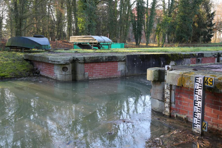 Die kleine Schleuse bei Uentrop wurde in der ersten Hälfte des 19. Jahrhunderts erbaut und gegen Ende des Jahres 1827 in Betrieb genommen. Sie diente im Verbund mit 11 anderen Schleusen ähnlicher Bauart dazu, die Lippe zwischen Lippstadt und Wesel schiffbar zu machen.